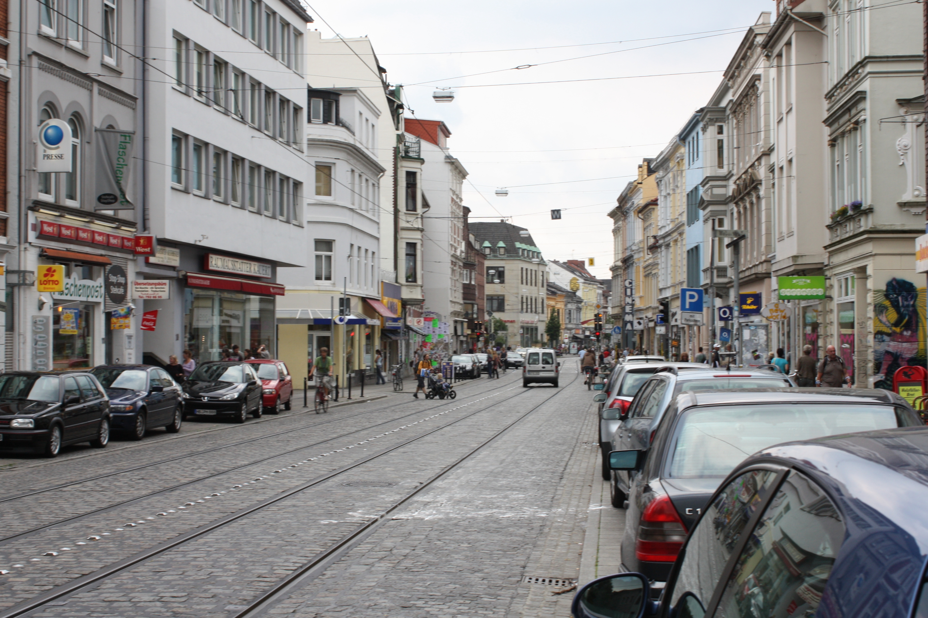 Bremen; 2009